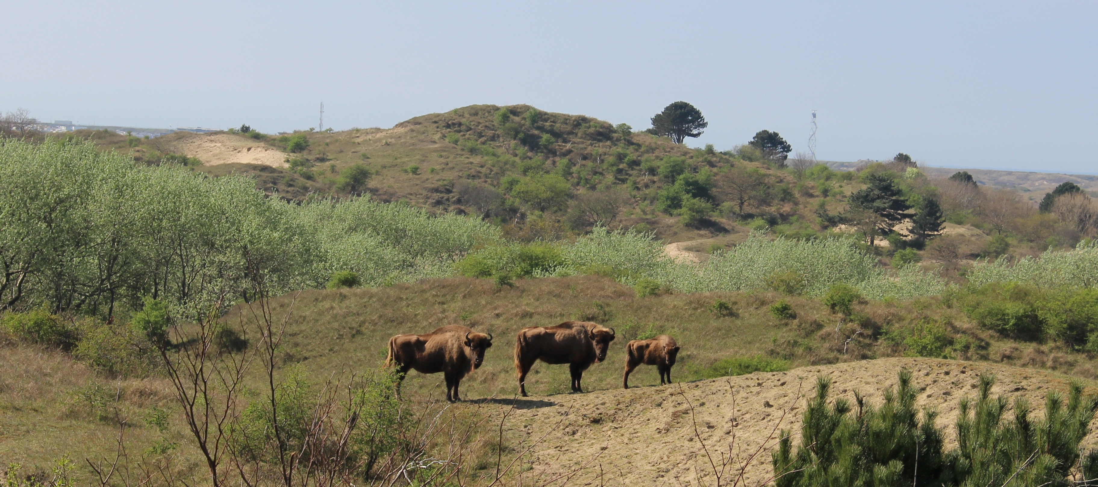 Wisentkoeien met kalf in nationaal park Zuid-Kennemerland in de provincie Noord-Holland in het noordwesten van Nederland